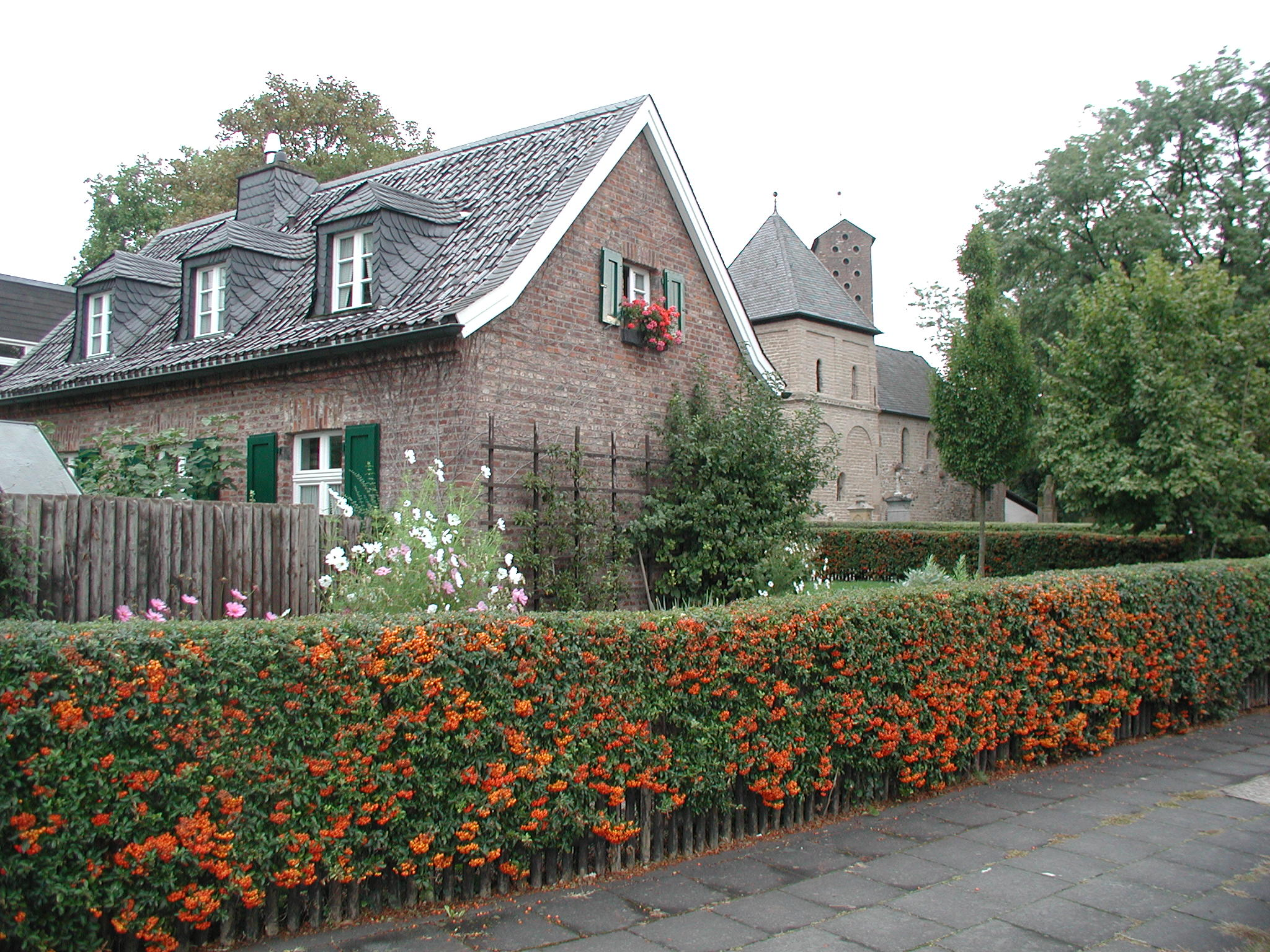 Koeln Lindenthal - Krieler Zwergschule